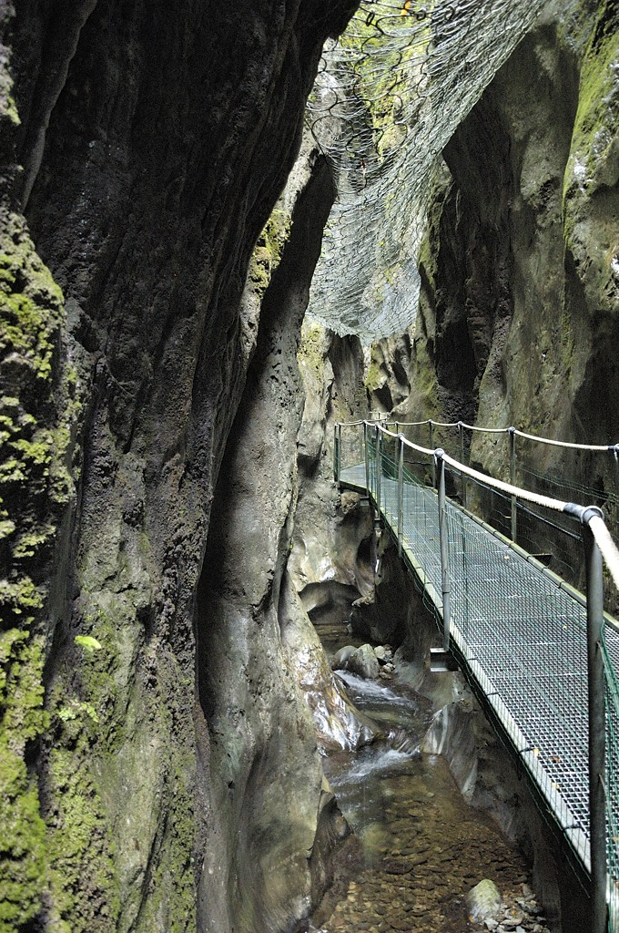 Gorges de la Fou